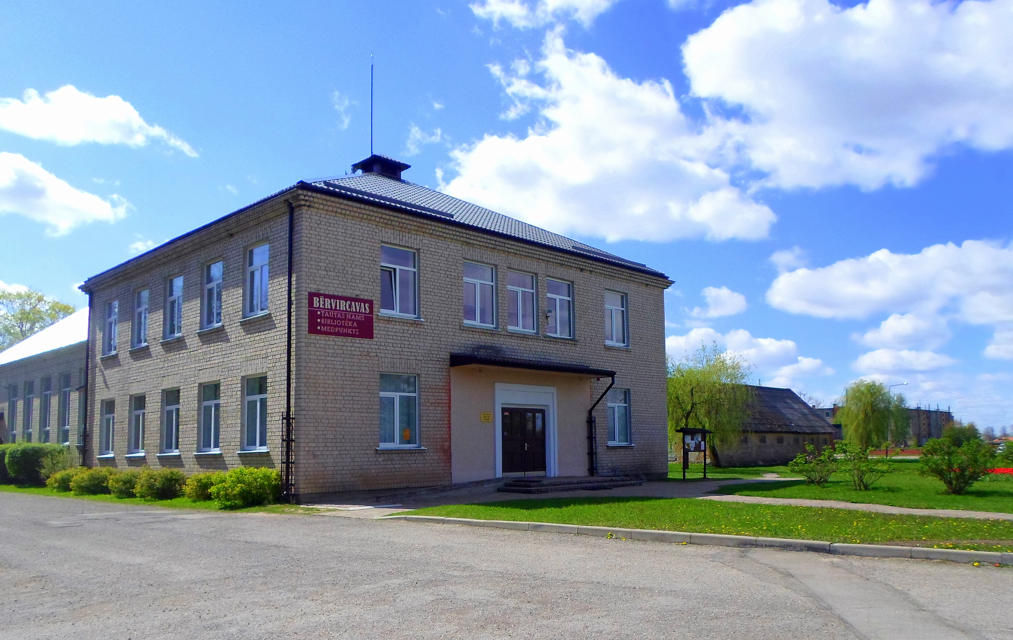 Bērzvircavas bibliotēka. Library at Bērzvircava. May, 2014